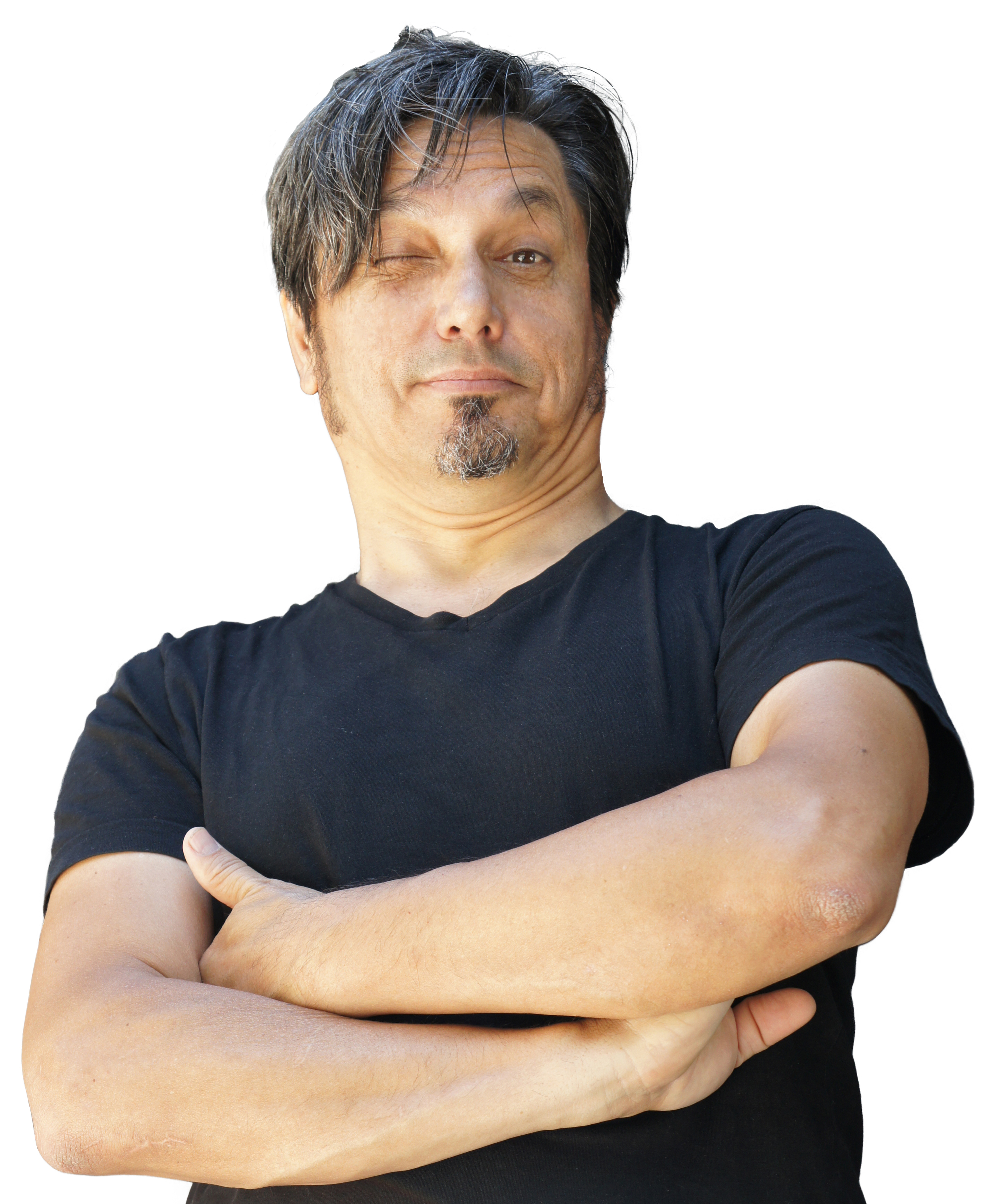 Muhsin Omurca - Tags Deutscher Nachts Türke